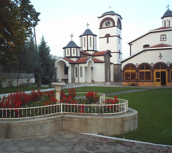 Църквата „Свети Георги“ в град Кочани, Република Македония. St George orthodox church in Kočani, R.o.Macedonia Cerkiew św. Jerzego w Kočani, Macedonia Црквата Св. Ѓорѓи во Кочани, Македонија